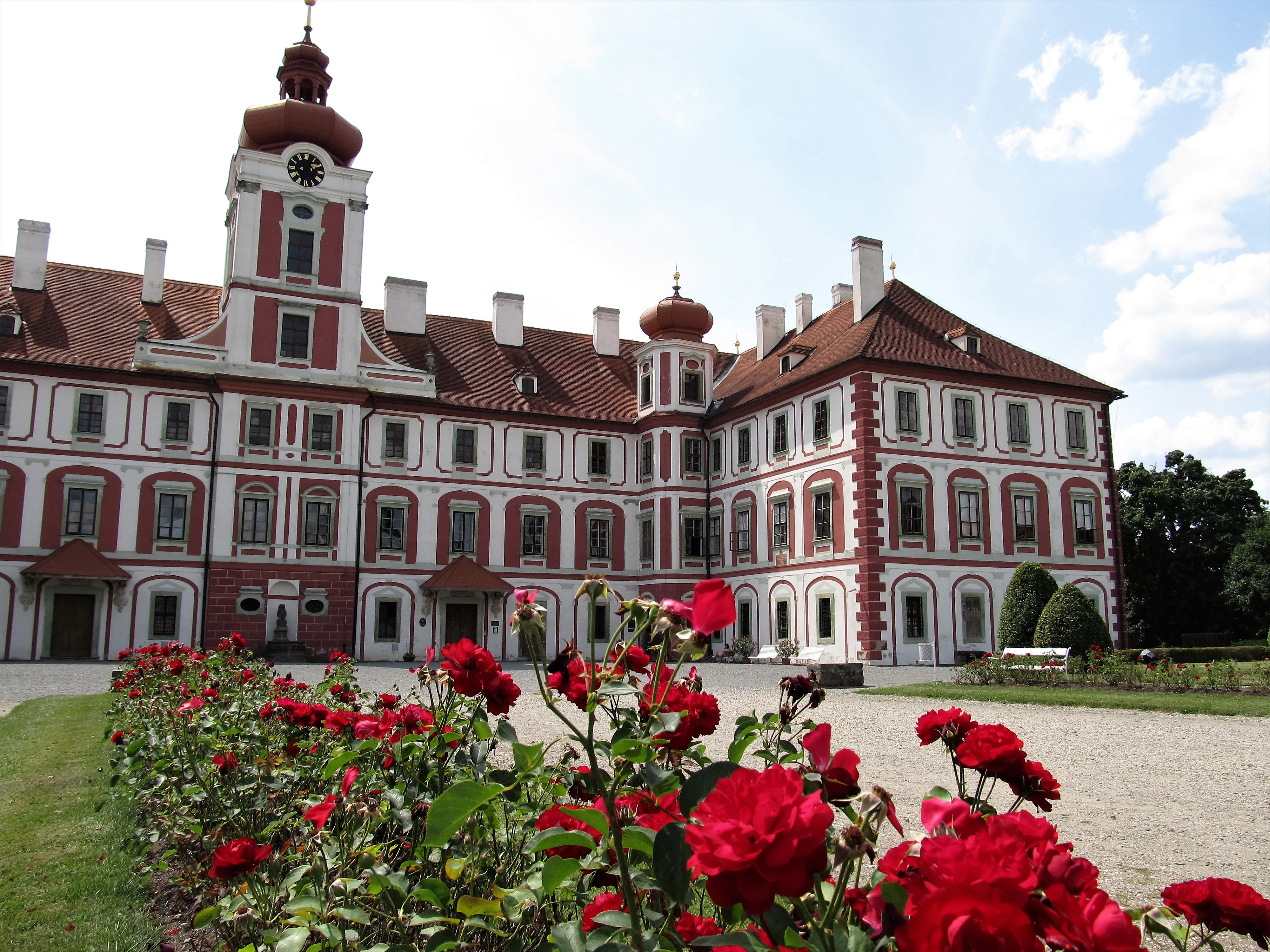 Hlavní budova zámku